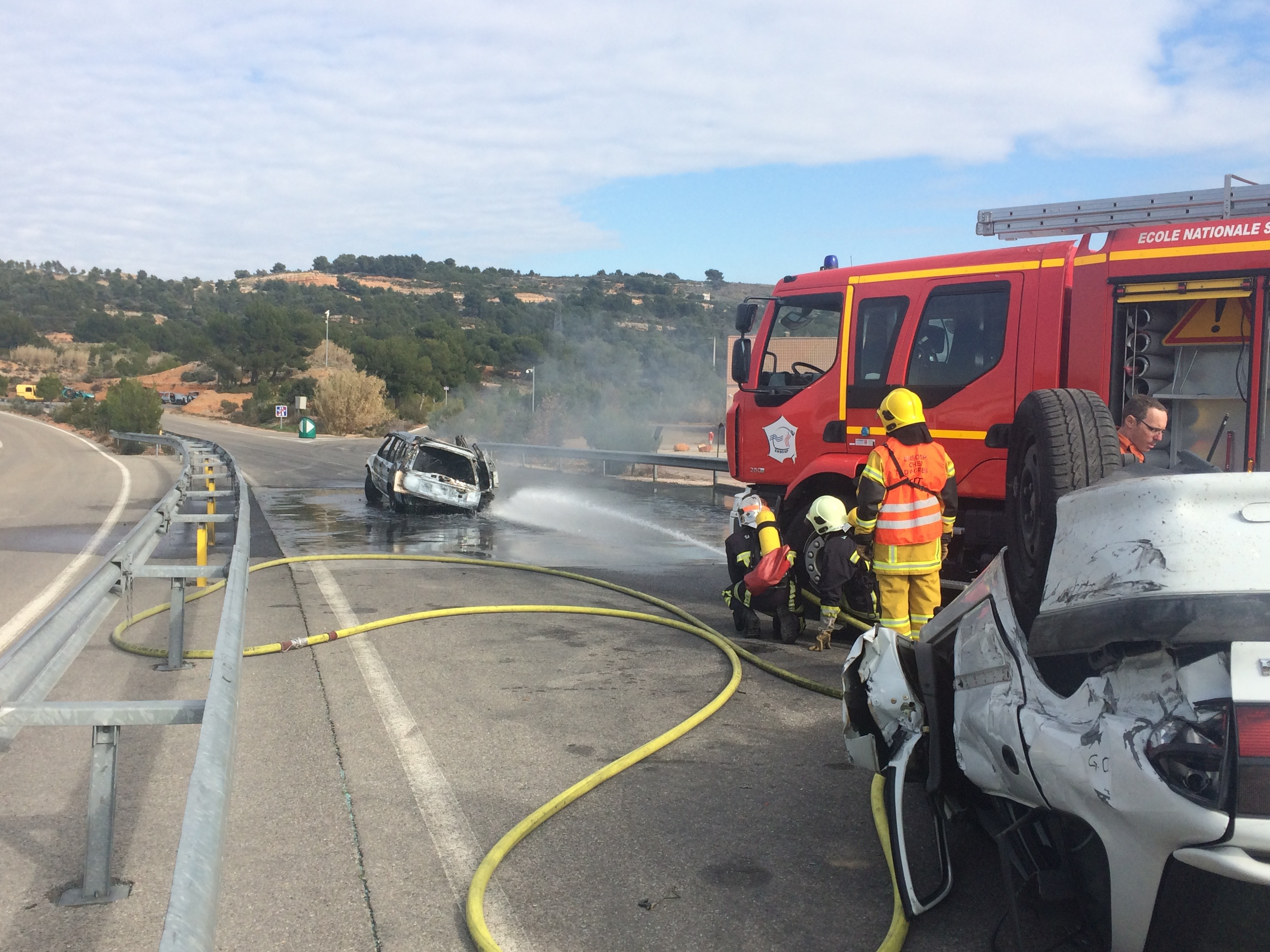 Simulation d'un feu de voiture sur la portion d'autoroute du plateau technique de Vitrolles.